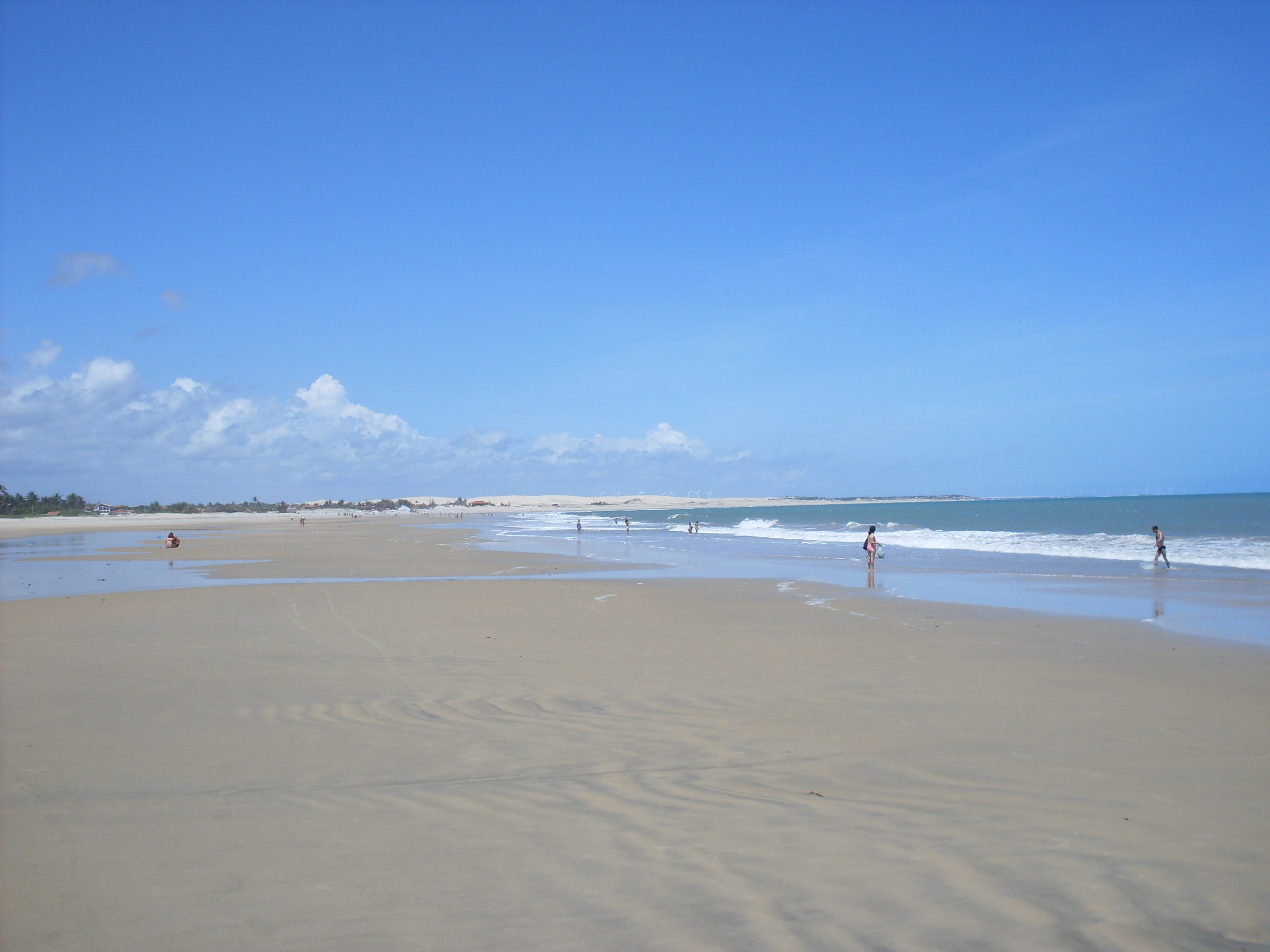 PECEM (CE) LUGAR LINDO 1